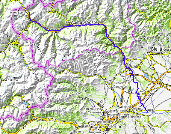 carte réalisée sur umap This map may be incomplete, and may contain errors. Don't rely solely on it for navigation.